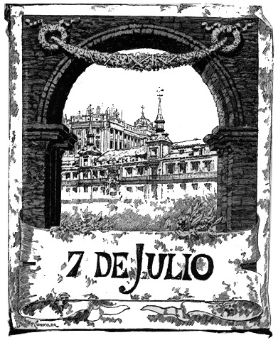 Ilustración de la novela 7 de Julio de Benito Pérez Galdós. Ilustraciones de Gómez Soler y Esteban. Madrid, Administración de La Guirnalda y Episodios Nacionales, 1881.